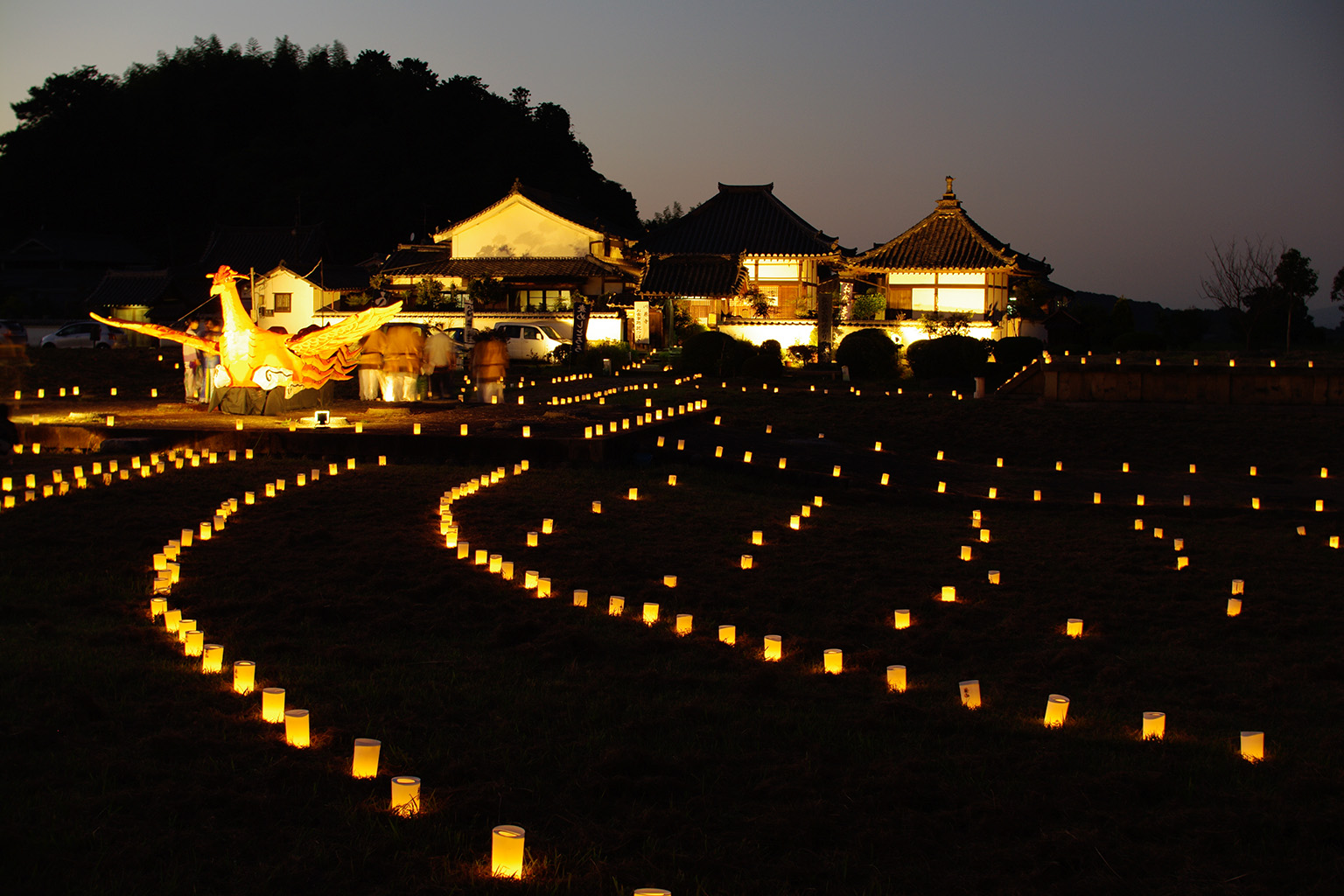 kawaradera temple-ruins illuminated